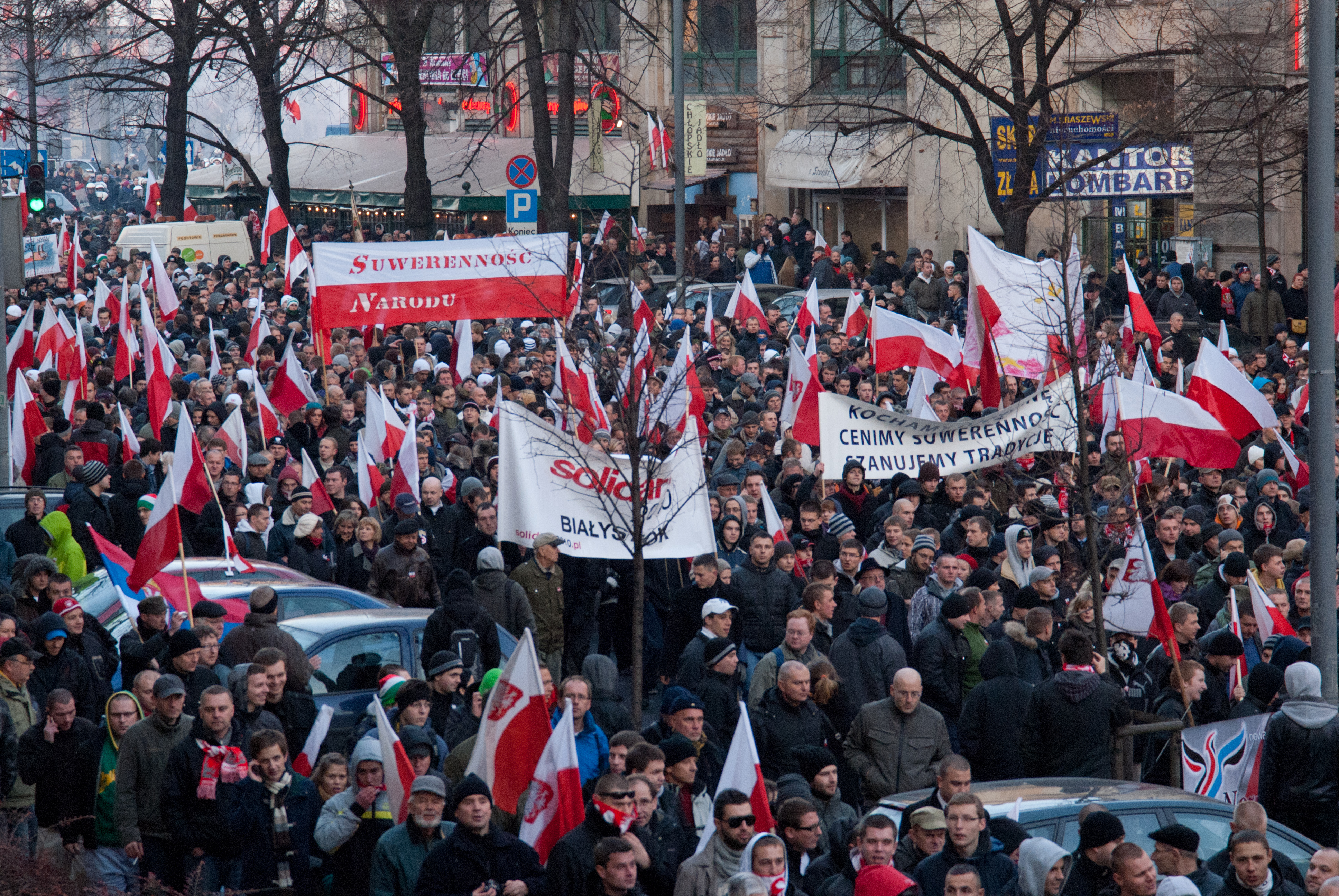 Warszawa, Marsz Niepodległości 2011, Plac Konstytucji